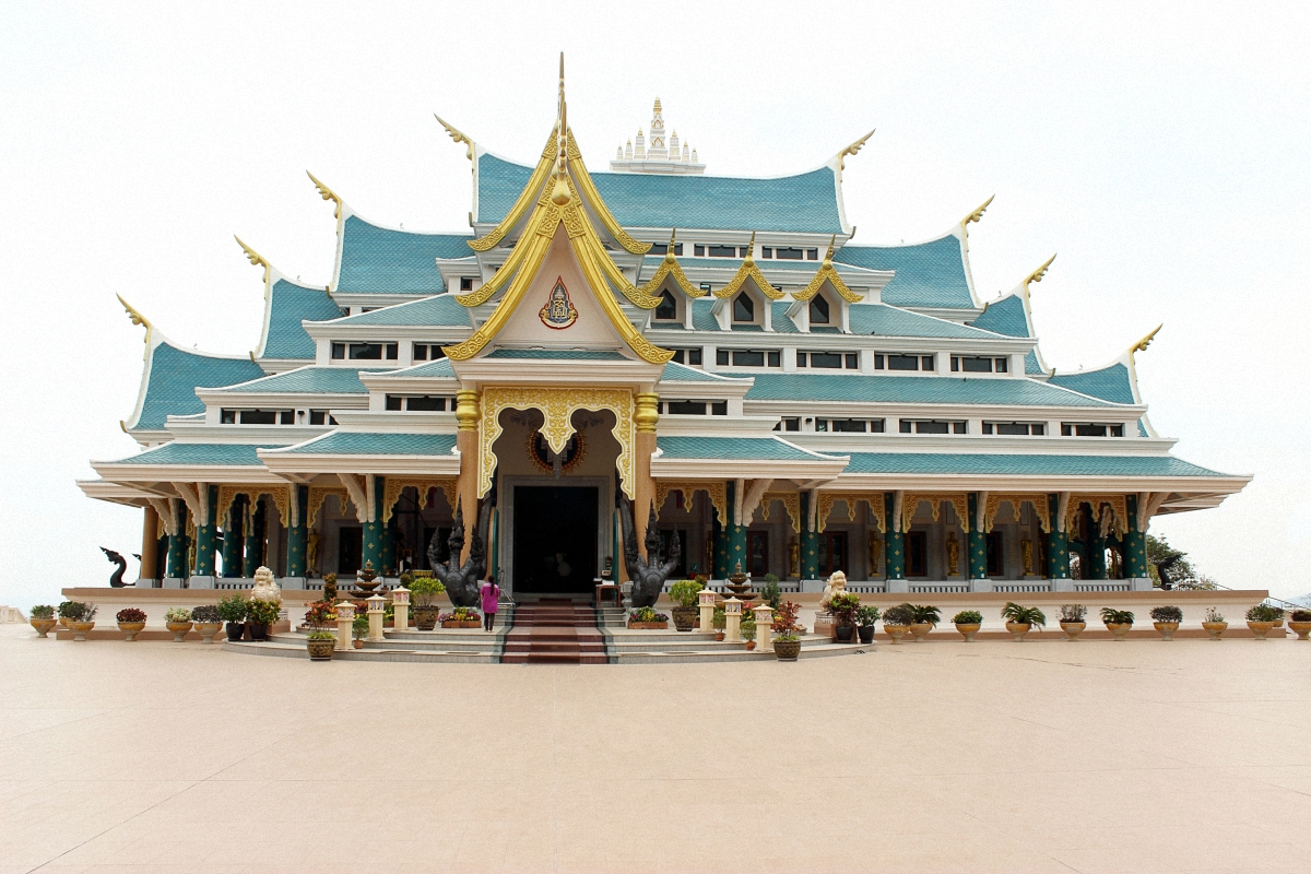 Wat Pa Phu Kon